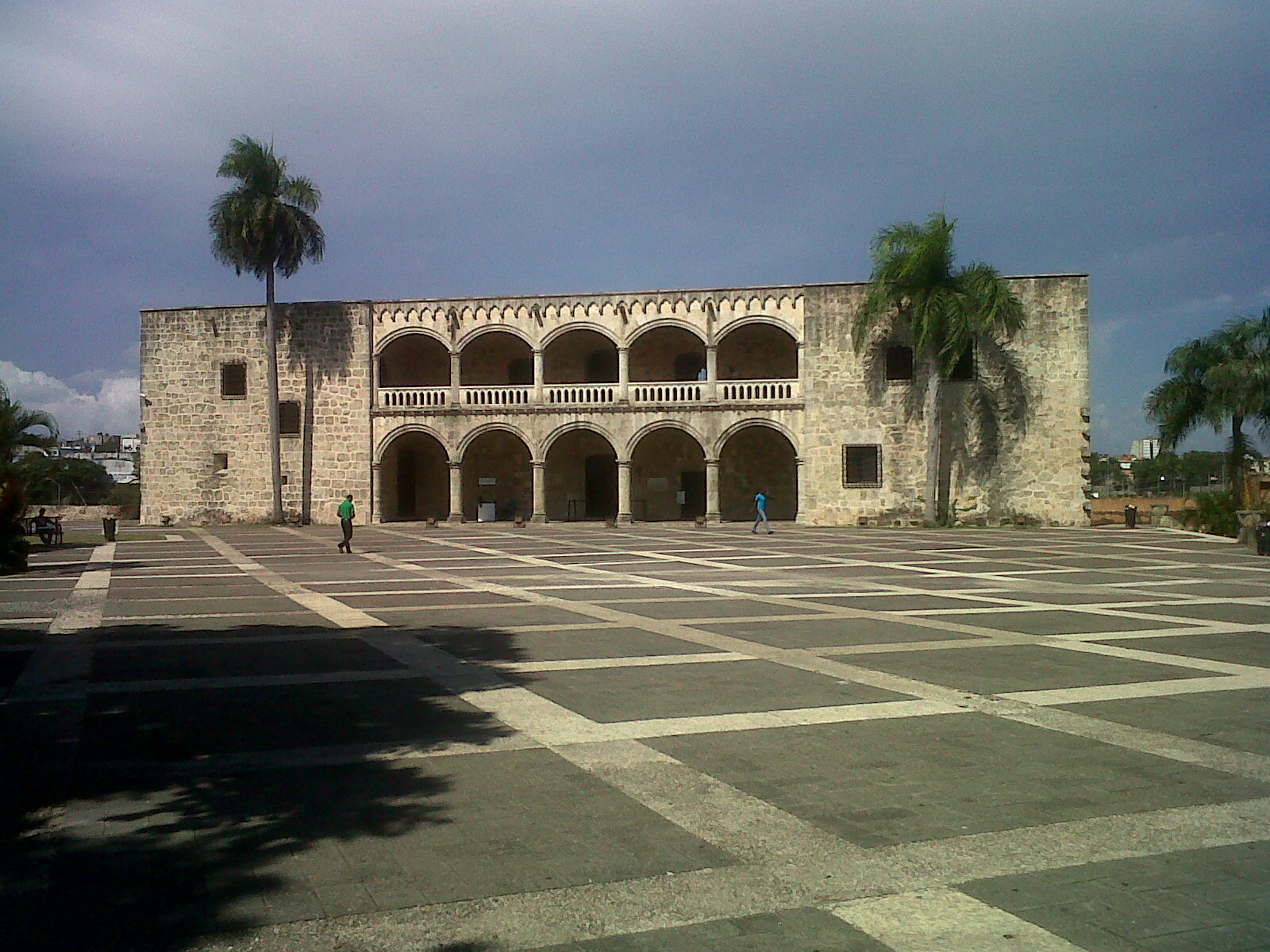 Palacio situado en la Ciudad Colonial de Santo Domingo, República Dominicana